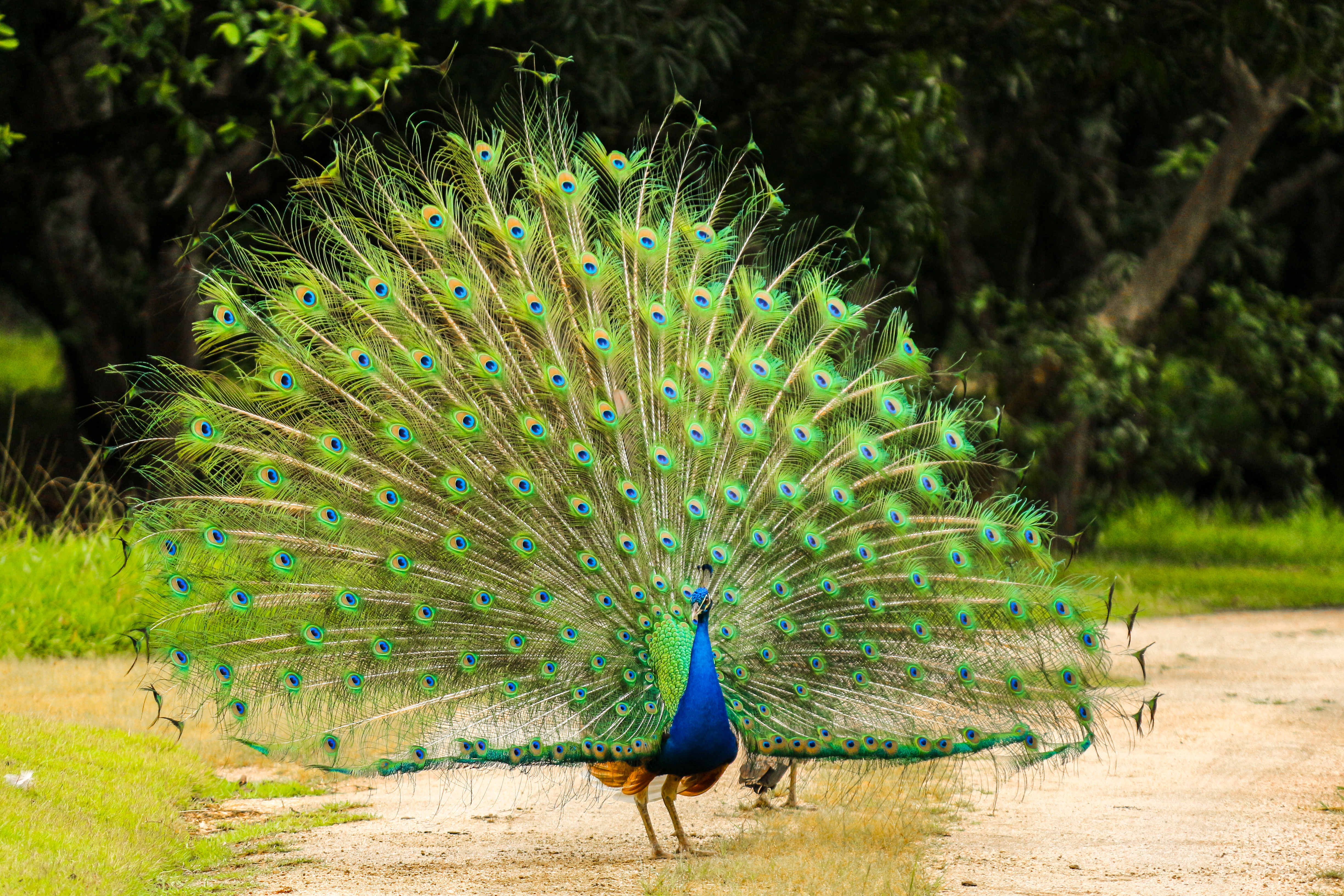 Pavão-indiano (Pavo cristatus) – Parque Ecológico Itapemirim (região de Mata Atlântica), no município de Cachoeiro de Itapemirim – Espírito Santo.